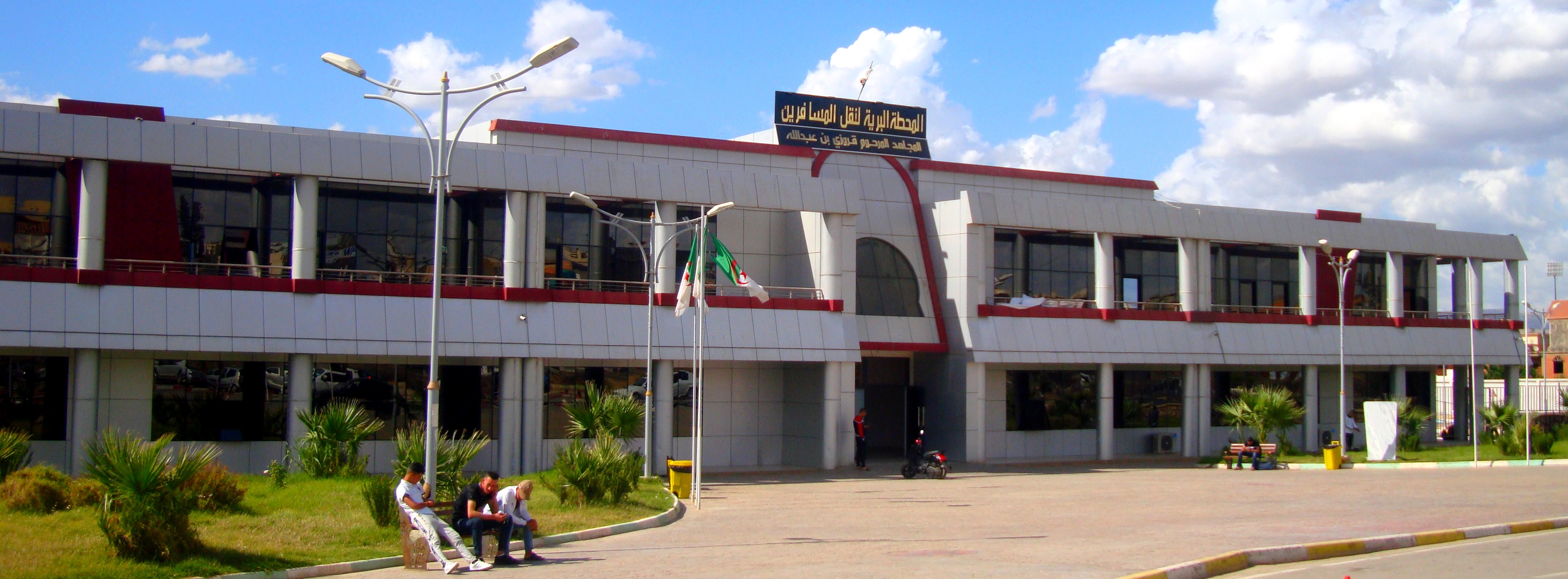 Gare routière SOGRAL à Chlef